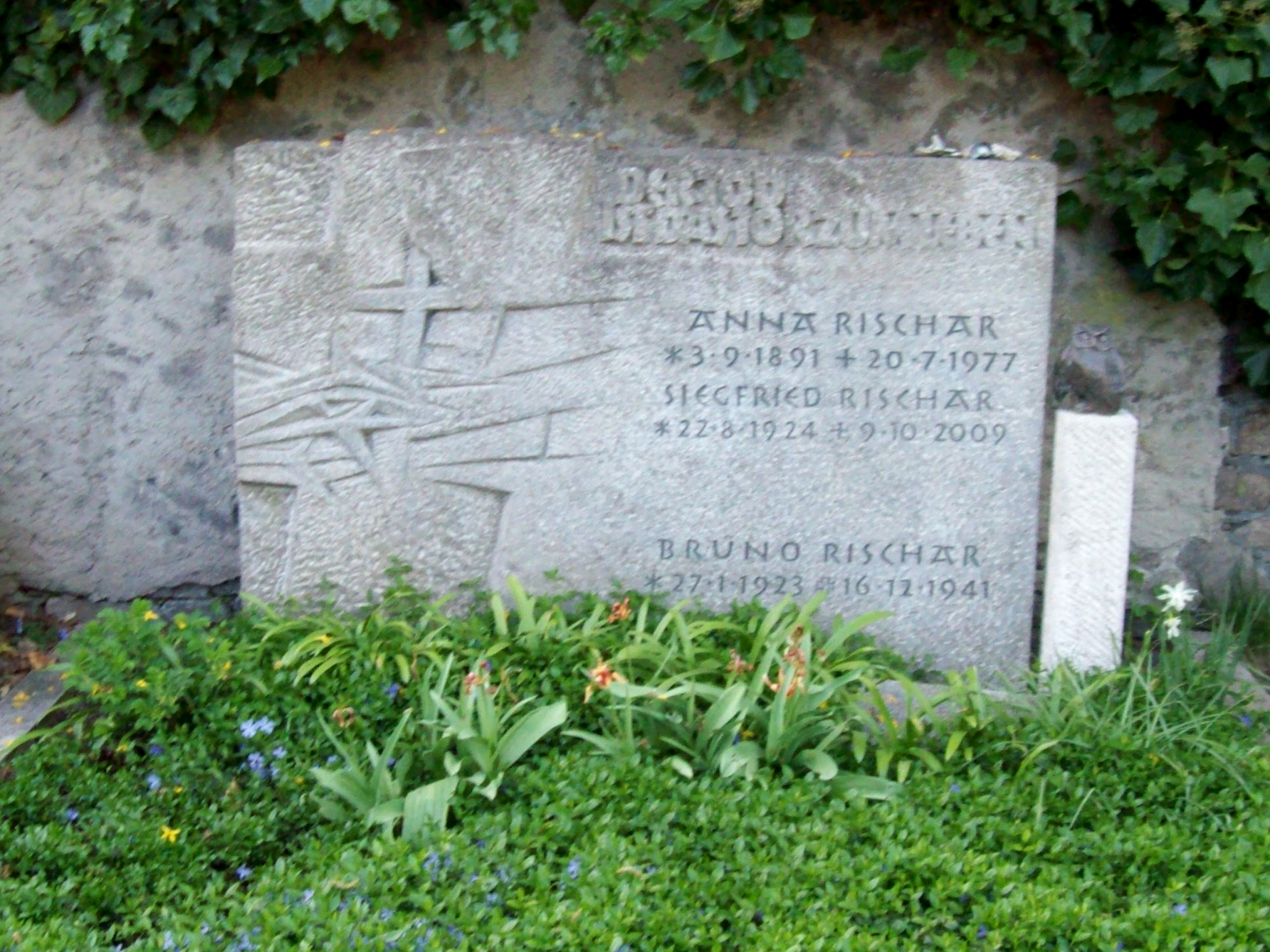 Grabstätte des Malers Siegfried Rischar *22. August 1924 in Aschaffenburg † 9. Oktober 2009 in Aschaffenburg